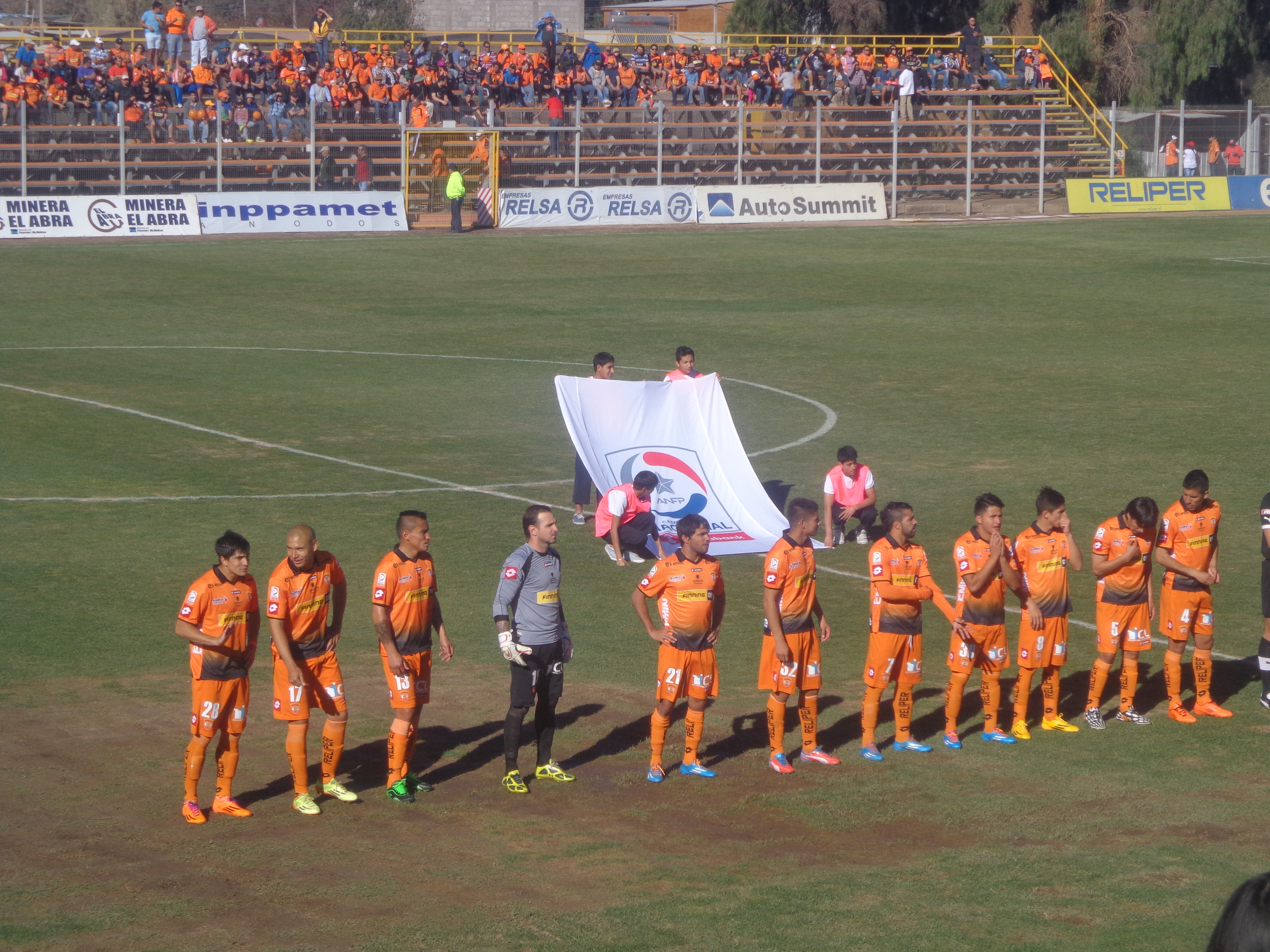 Cobreloa 2014